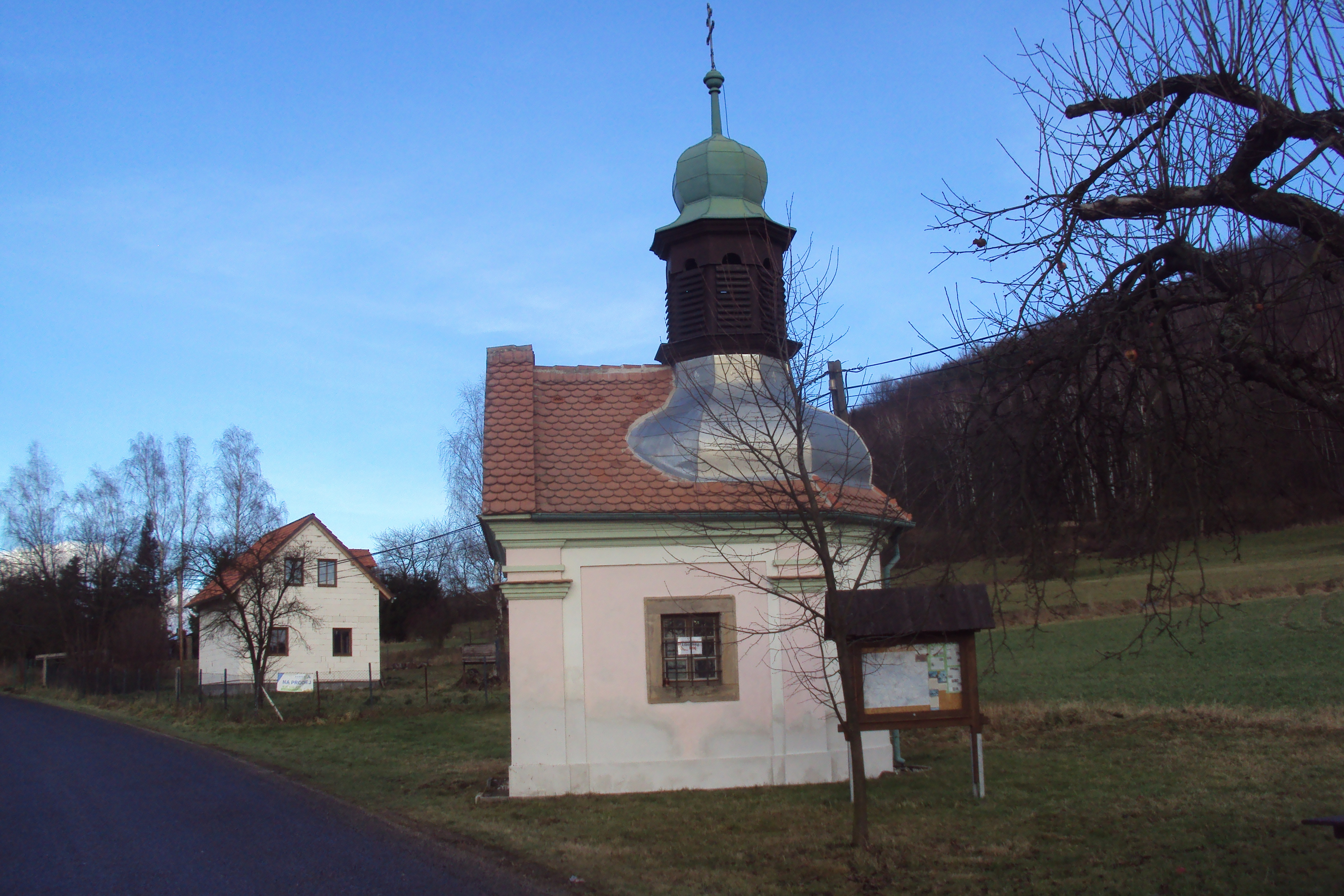 Kaple sv. Josefa